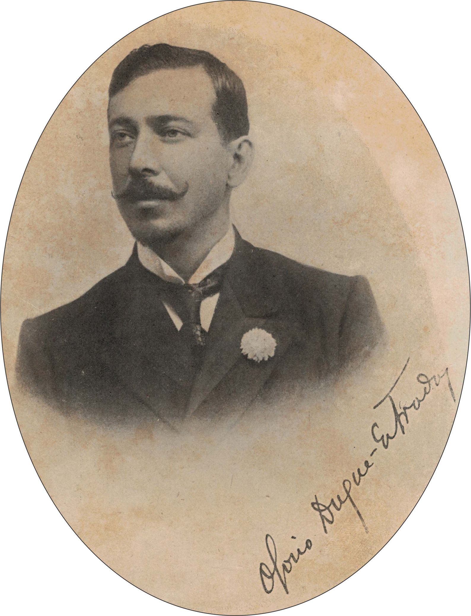 Retrato e assinatura do poeta brasileiro, Joaquim Osório Duque-Estrada, no livro dele, Flora de Maio, de 1902.